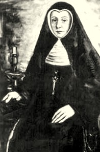 Apollonia Radermecher, Ordensgründerin der Elisabethinen